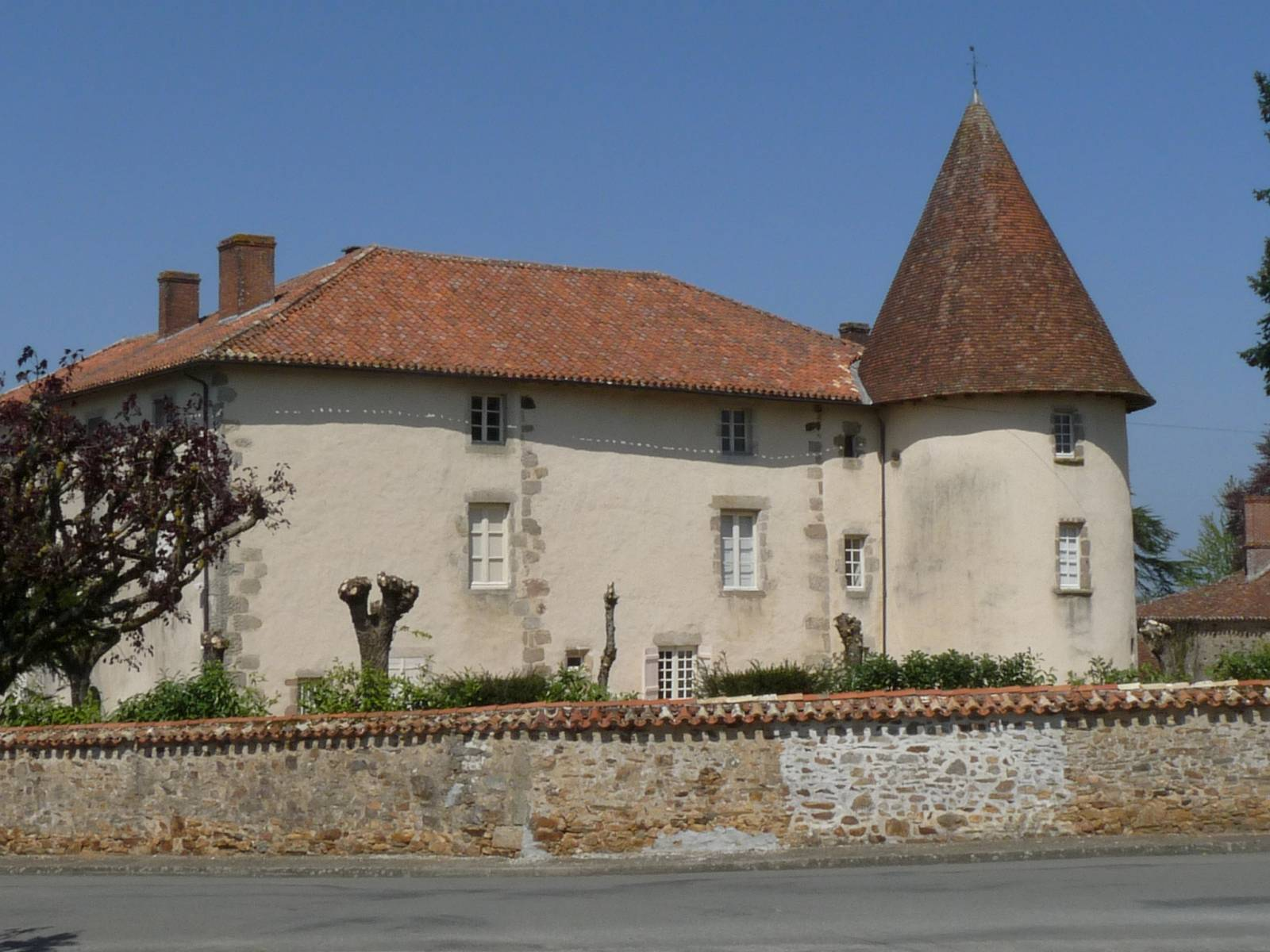 Logis de St-Christophe, Charente, France